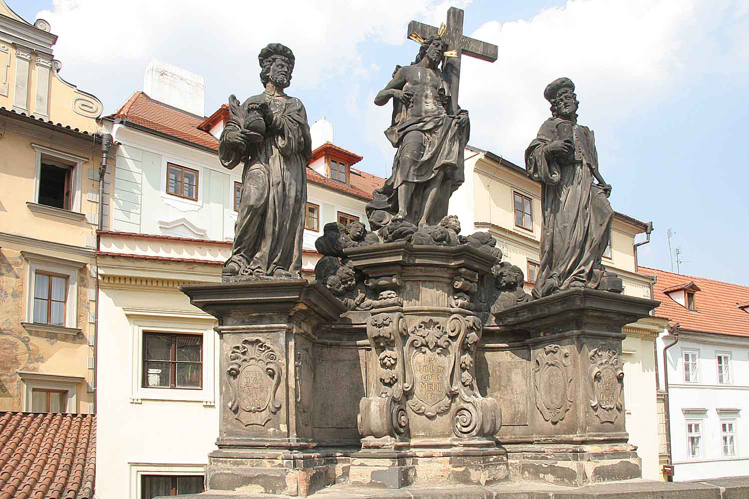 Česky: Sousoší Svatého Kosmy a Damiána na Karlově mostě